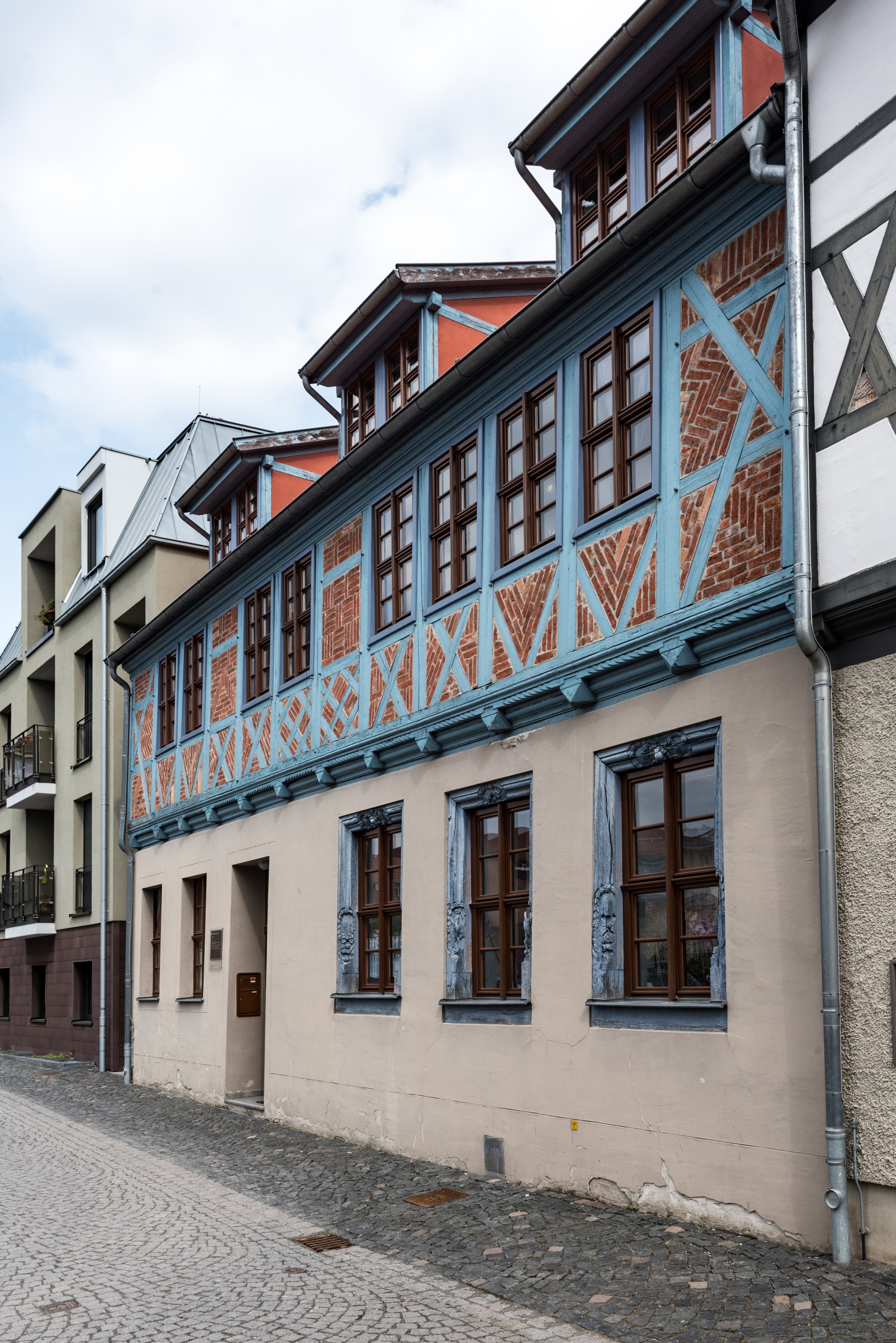 Aschersleben, Schuhstieg 10